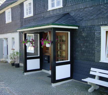 Bauernhaus in Niederstaffelbach (Gemeinde Nümbrecht)